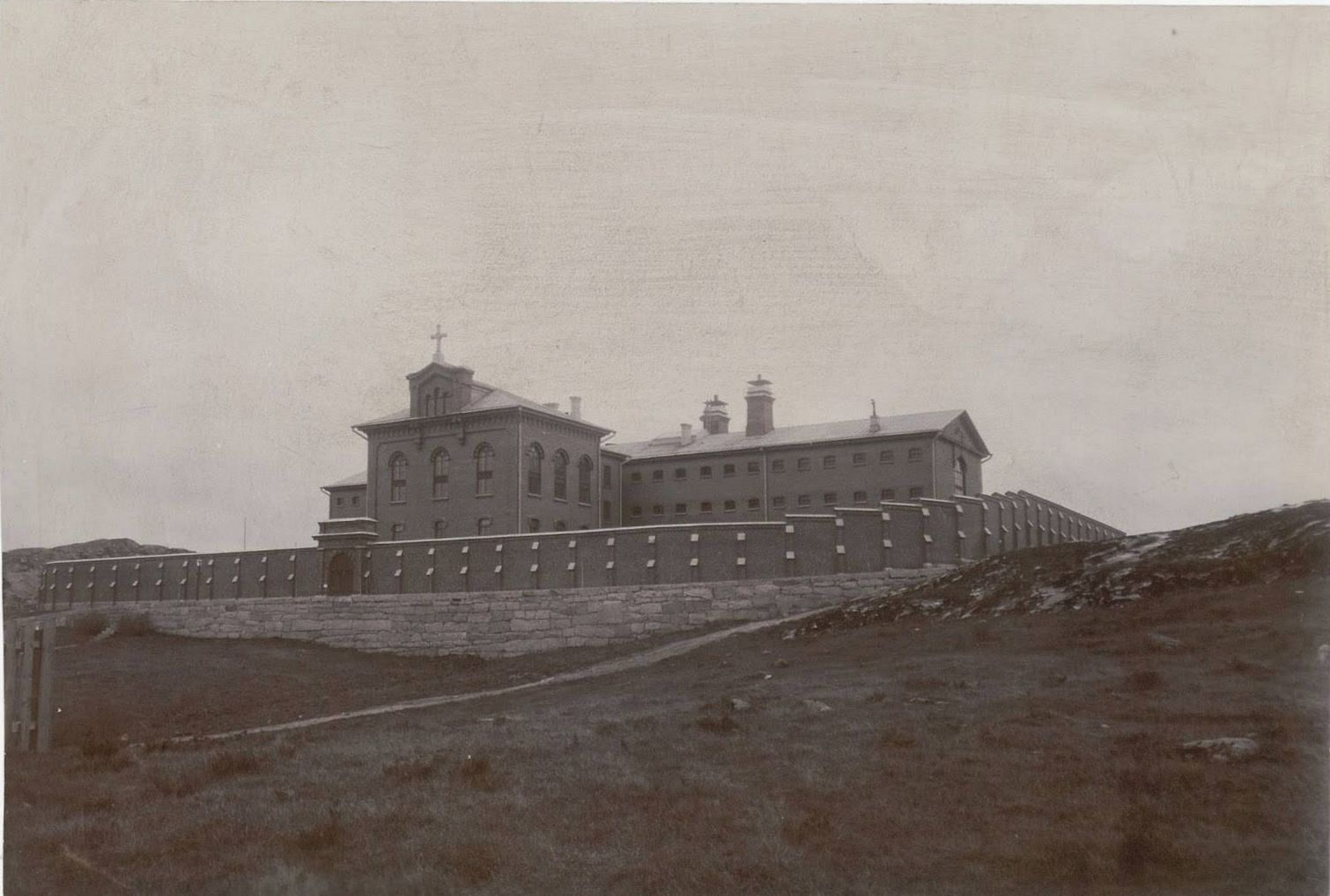 Kakolanmäki Turussa